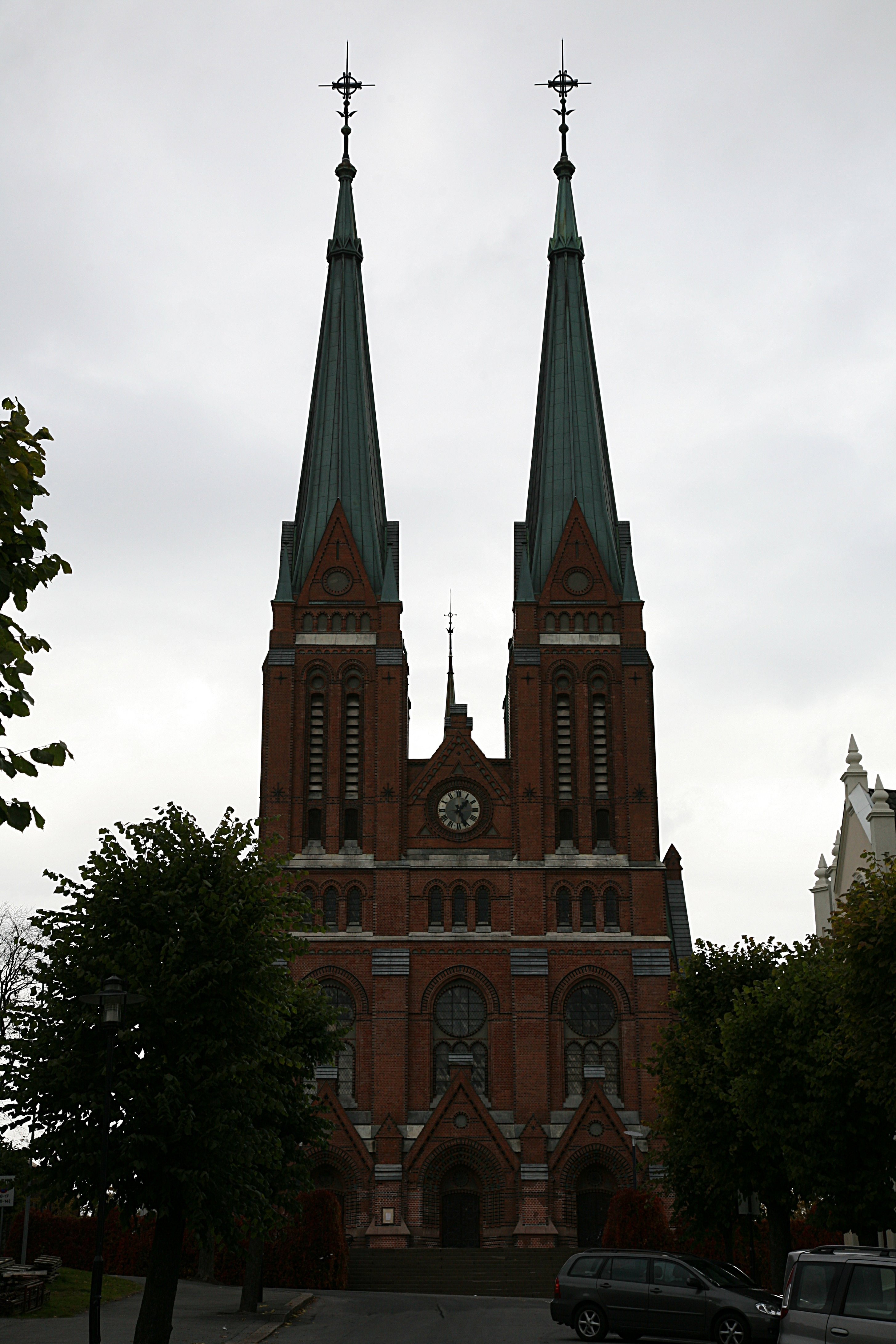 Skien kirke. A church in Skien, Telemark, Norway.